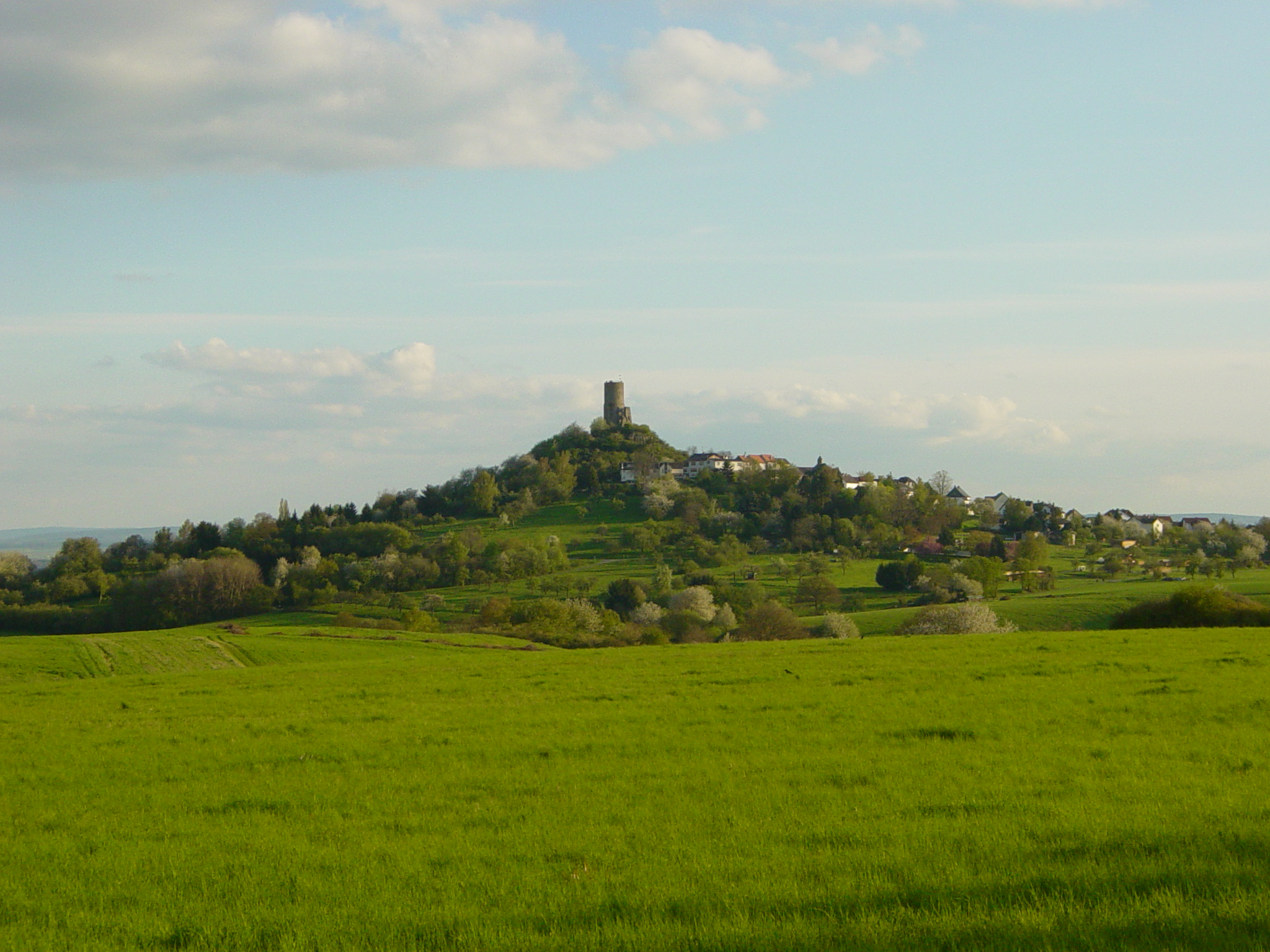 Vetzberg, von Norden